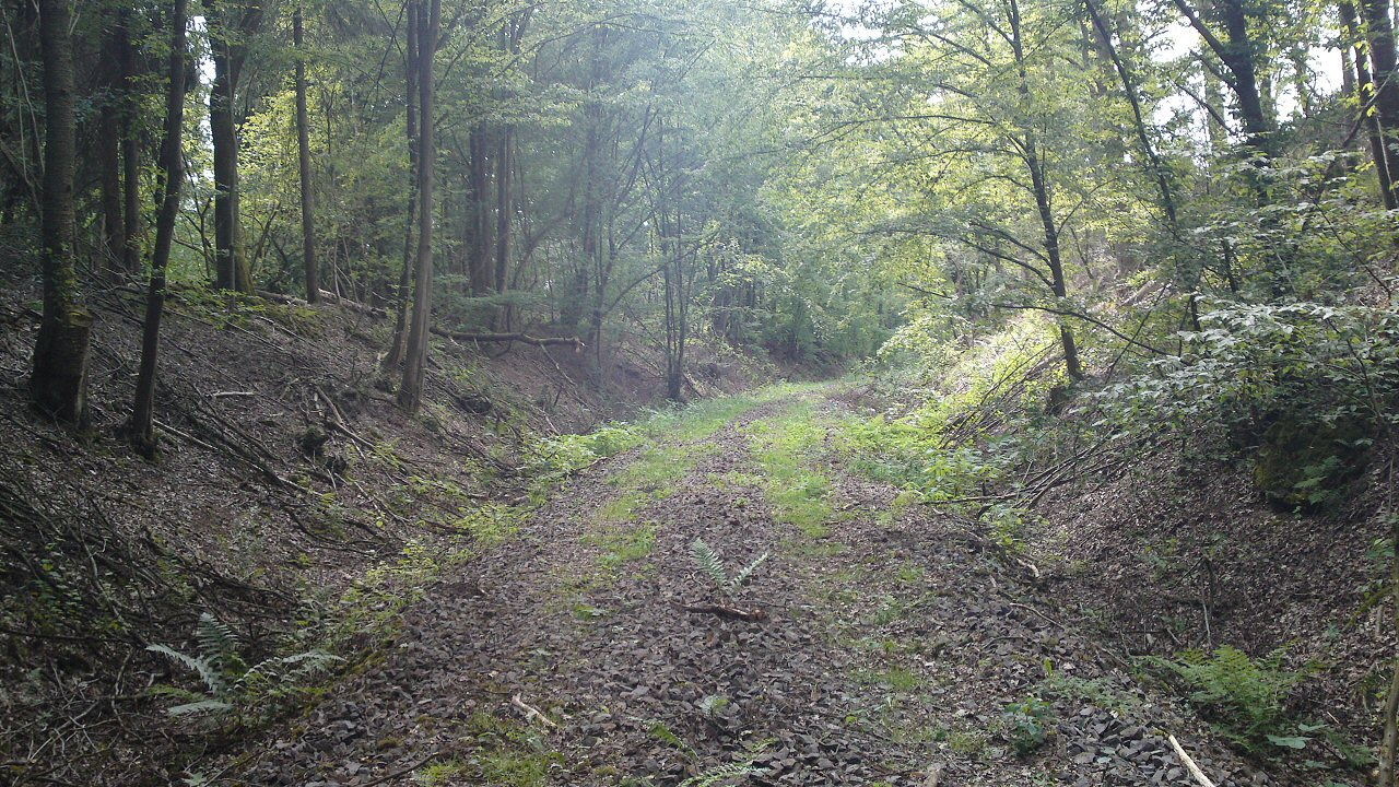 Sülztalbahn, Schotterbett bei Hommerich (Lindlar)